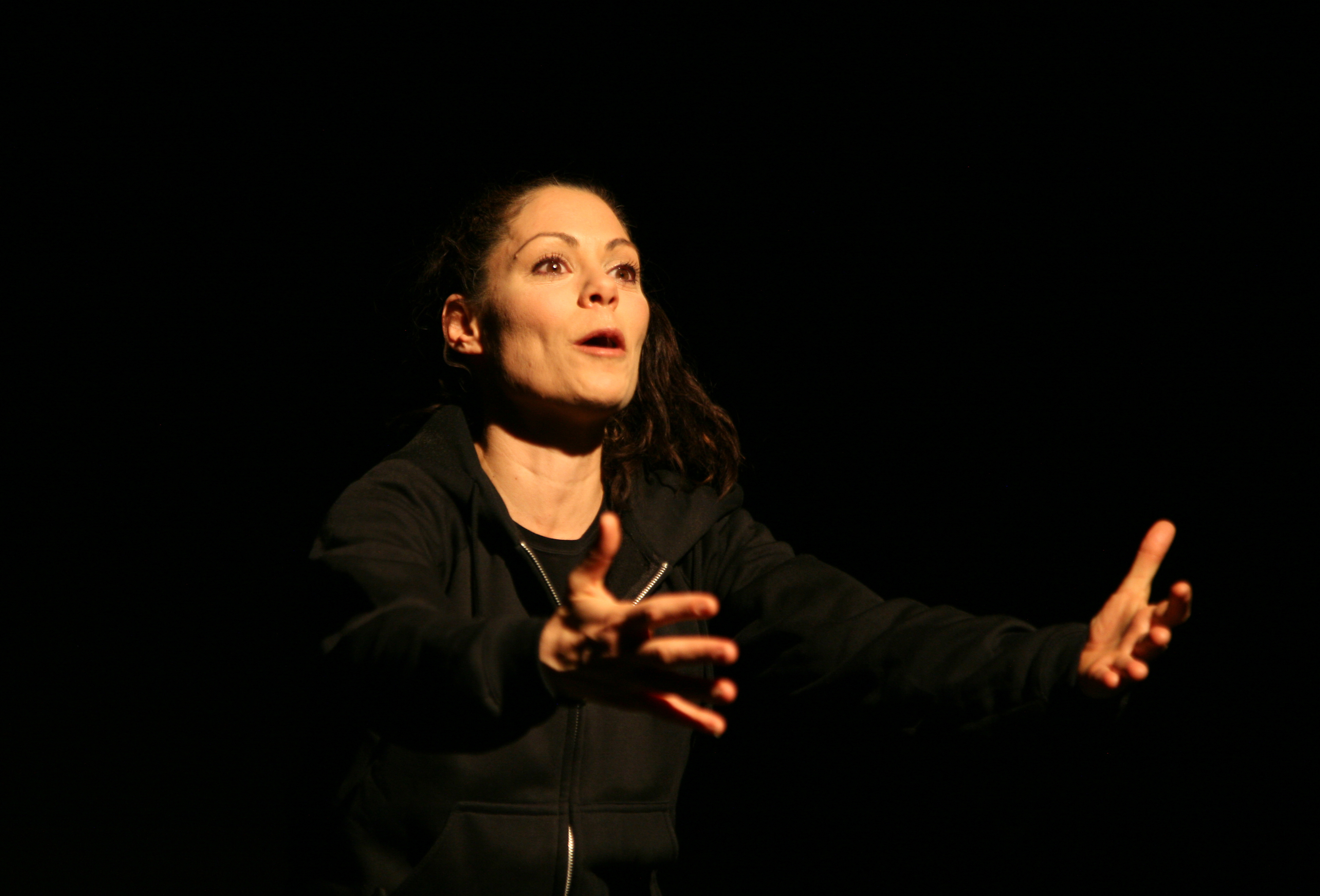 מיקי פלג רוטשטיין בהצגה פשוטה